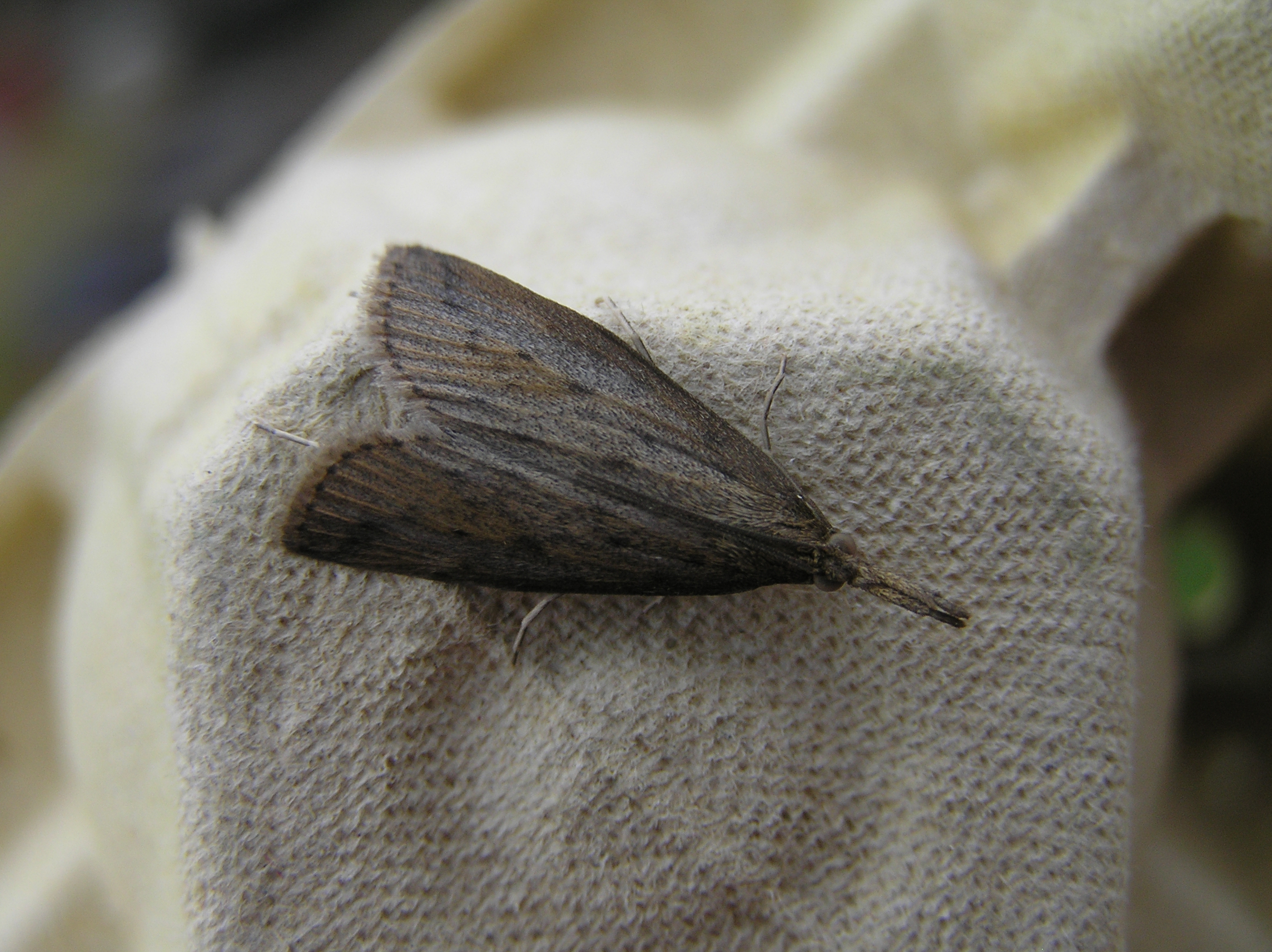 Schoenobius gigantella male